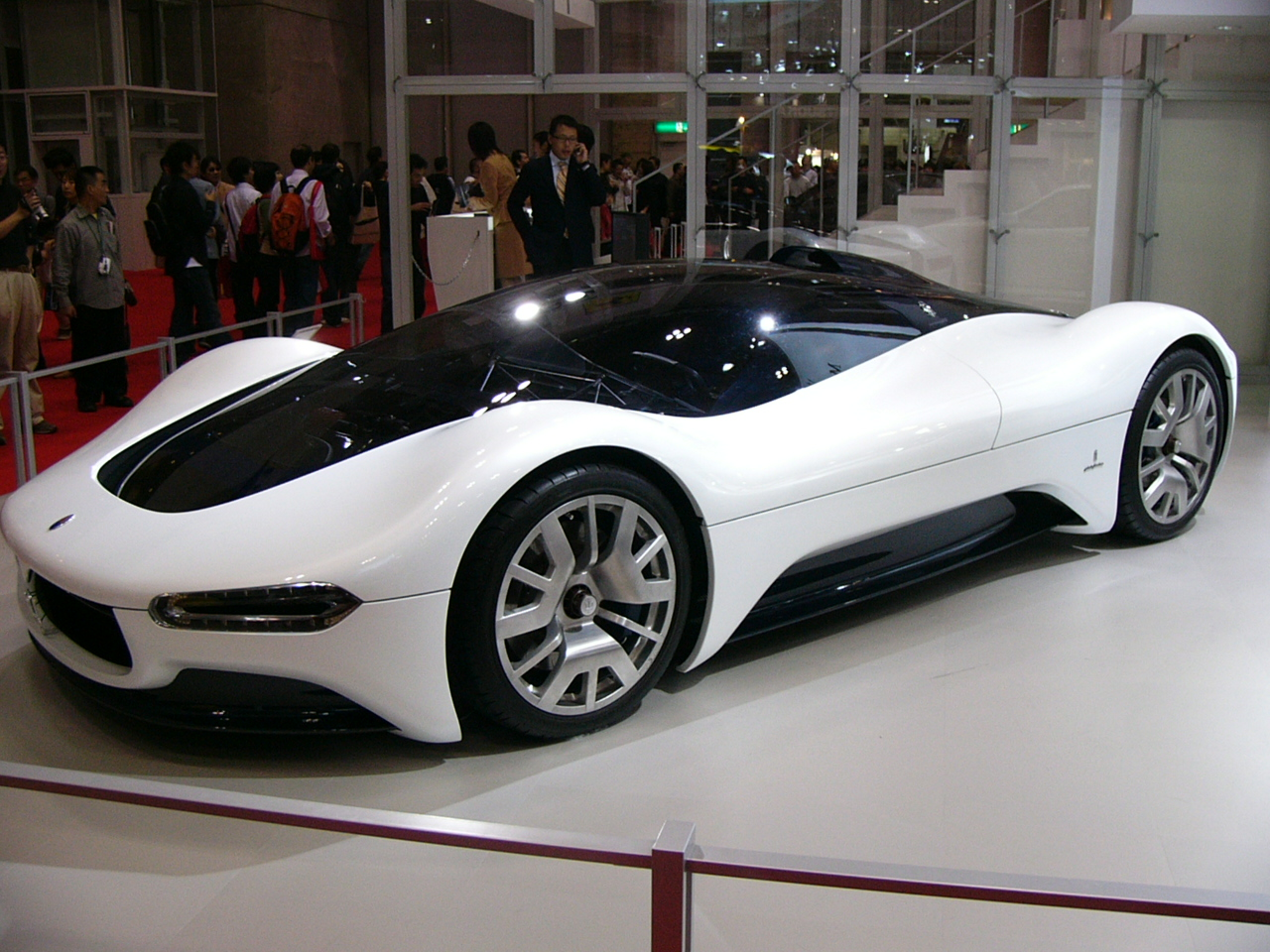 マセラティ・バードケイジ 東京モーターショー2005にて撮影